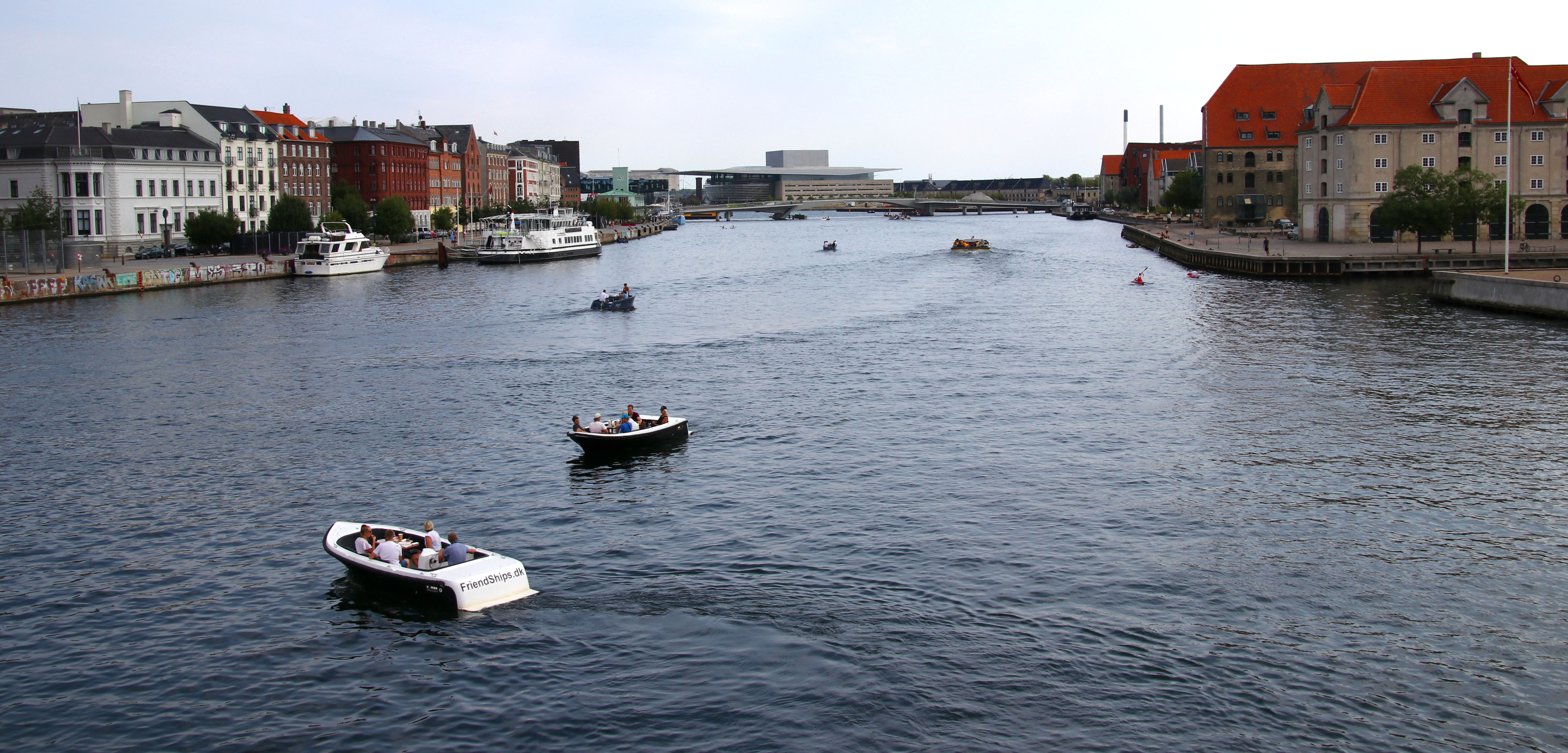 København / Copenhagen. I Inderhavnen.